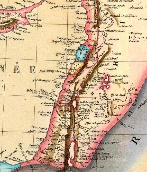 Asie Mineure. Turquie d'Asie, Syrie, Liban. Region du Caucase. Atlas spheroidal & universel de geographie dresse par F.A. Garnier, geographe. Vve. Jules Renouard, Editeur, Rue de Tournon, no. 6, Paris. 1860. Impie. Sarazin, r. Git-le-Coeur, 8, Paris.